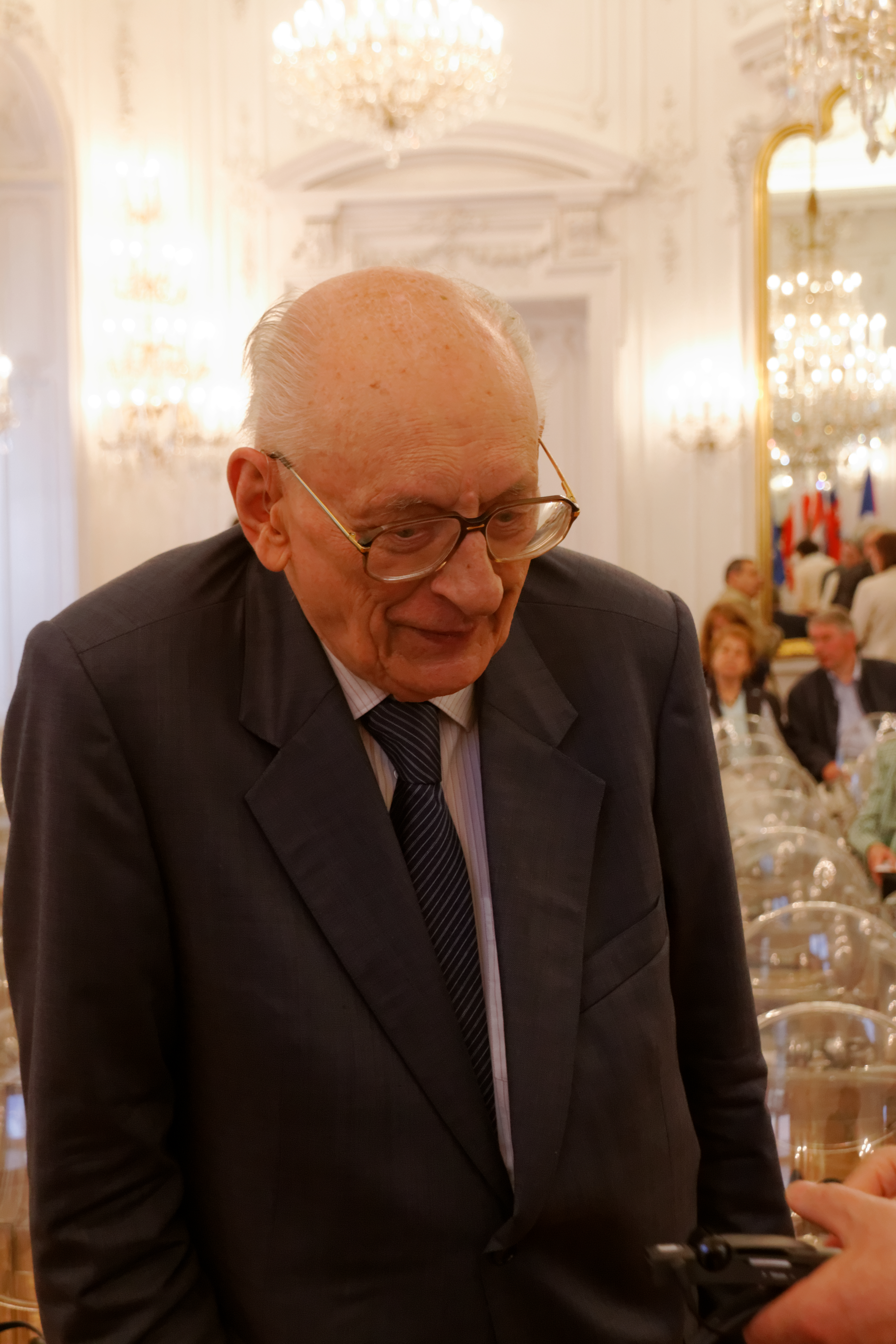 Władysław Bartoszewski 2013 in der Andrássy Universität Budapest